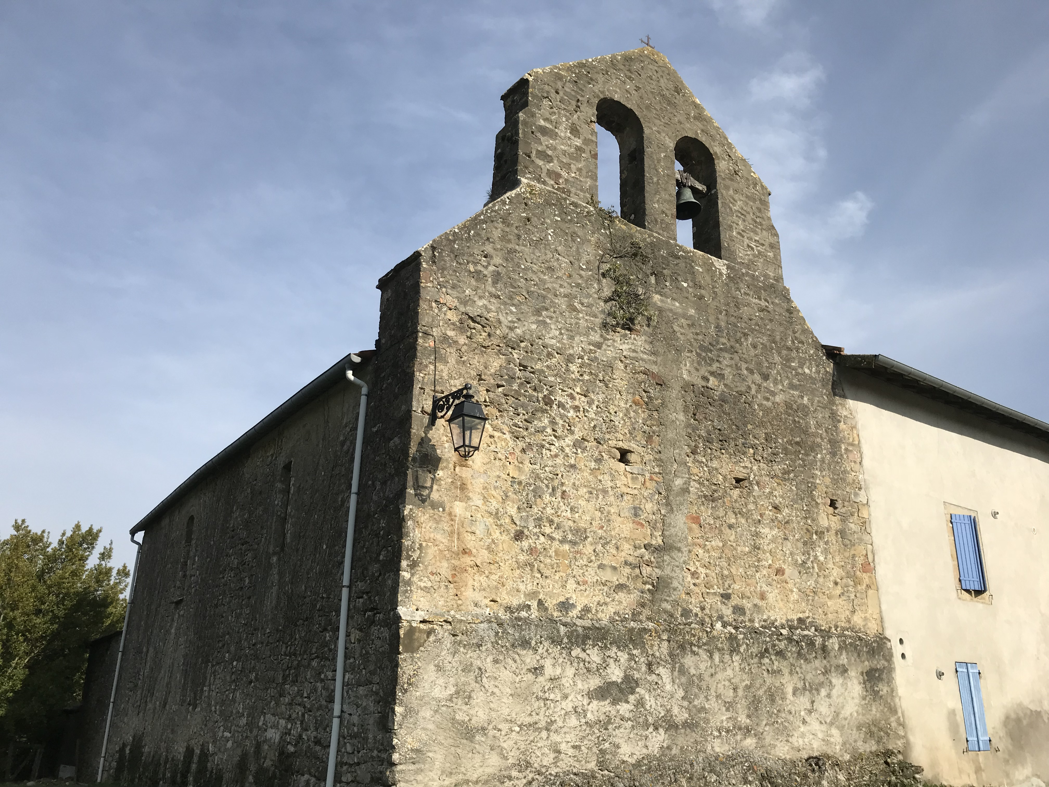 L'église de Saint-Julien-de-Gras-Capou (Ariège, France).